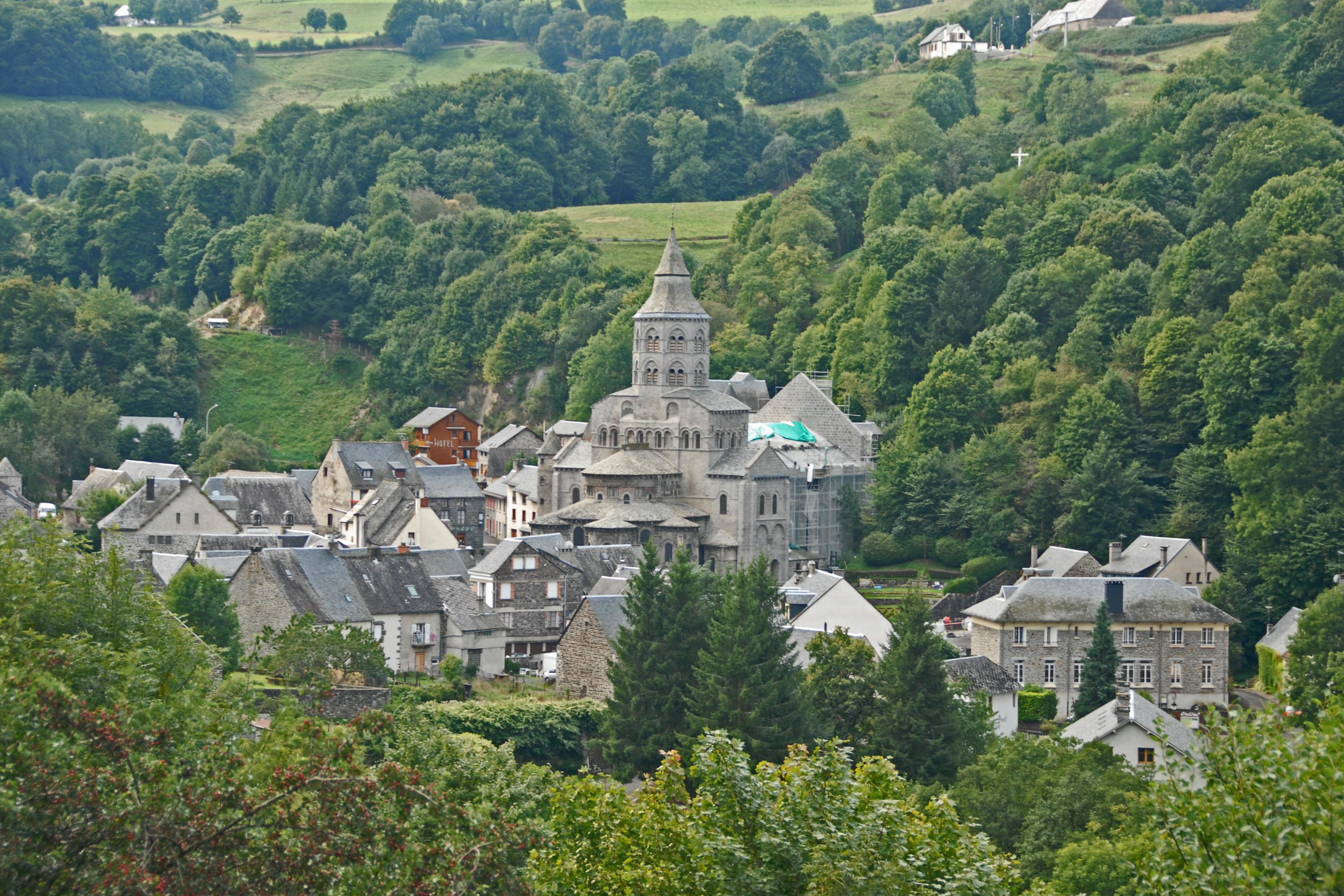 N.-D.d'Orcival, Blick vom gegenüber liegenden Hang